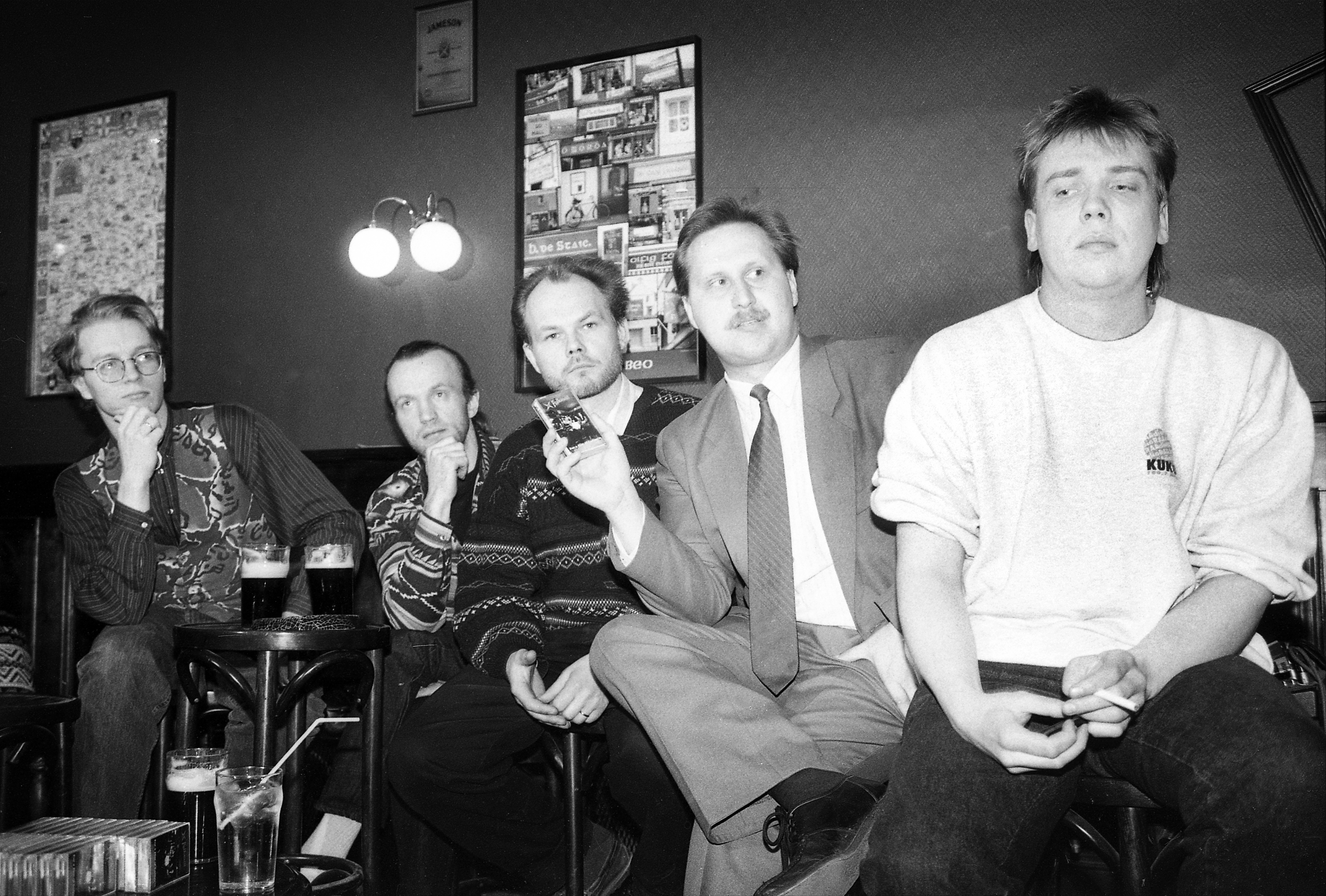 Ansambel Folkmill. Kasseti esitlus Hellast Hundis 1994. aastal.